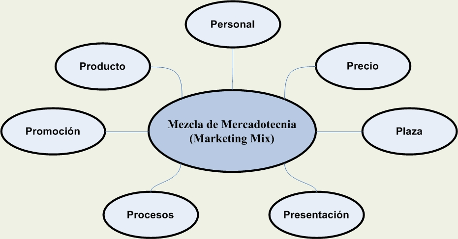 Relacion de los elementos de la mezcla de mercadotécnia, incluyendo los elementos de la mercadotécnia social y de servicios.